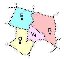 Carte du canton d'Offemont (Territoire de Belfort)